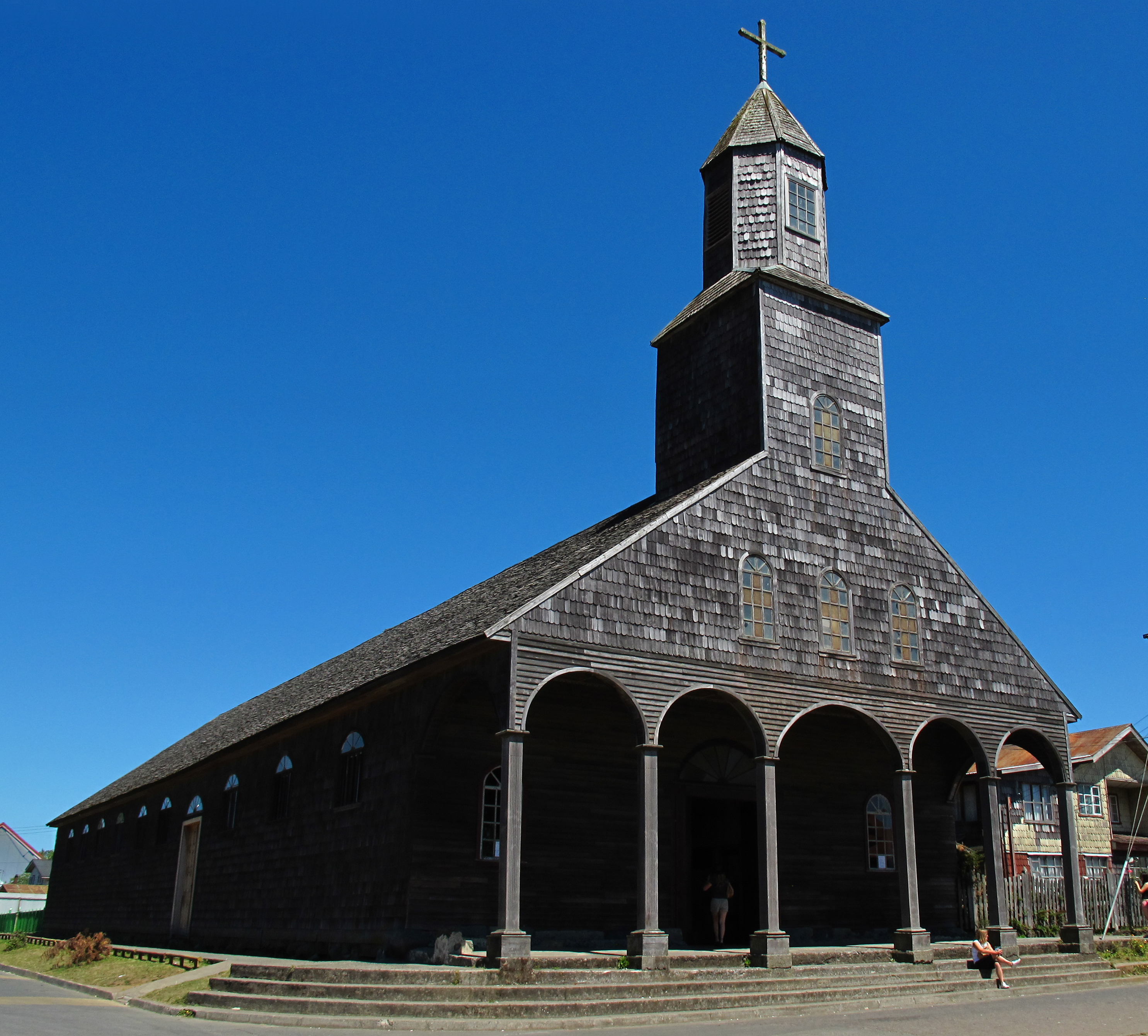 Iglesia Santa María de Loreto de Achao, declarada Patrimonio de la Humanidad por la UNESCO, en el archipiélago de Chiloé al sur de Chile